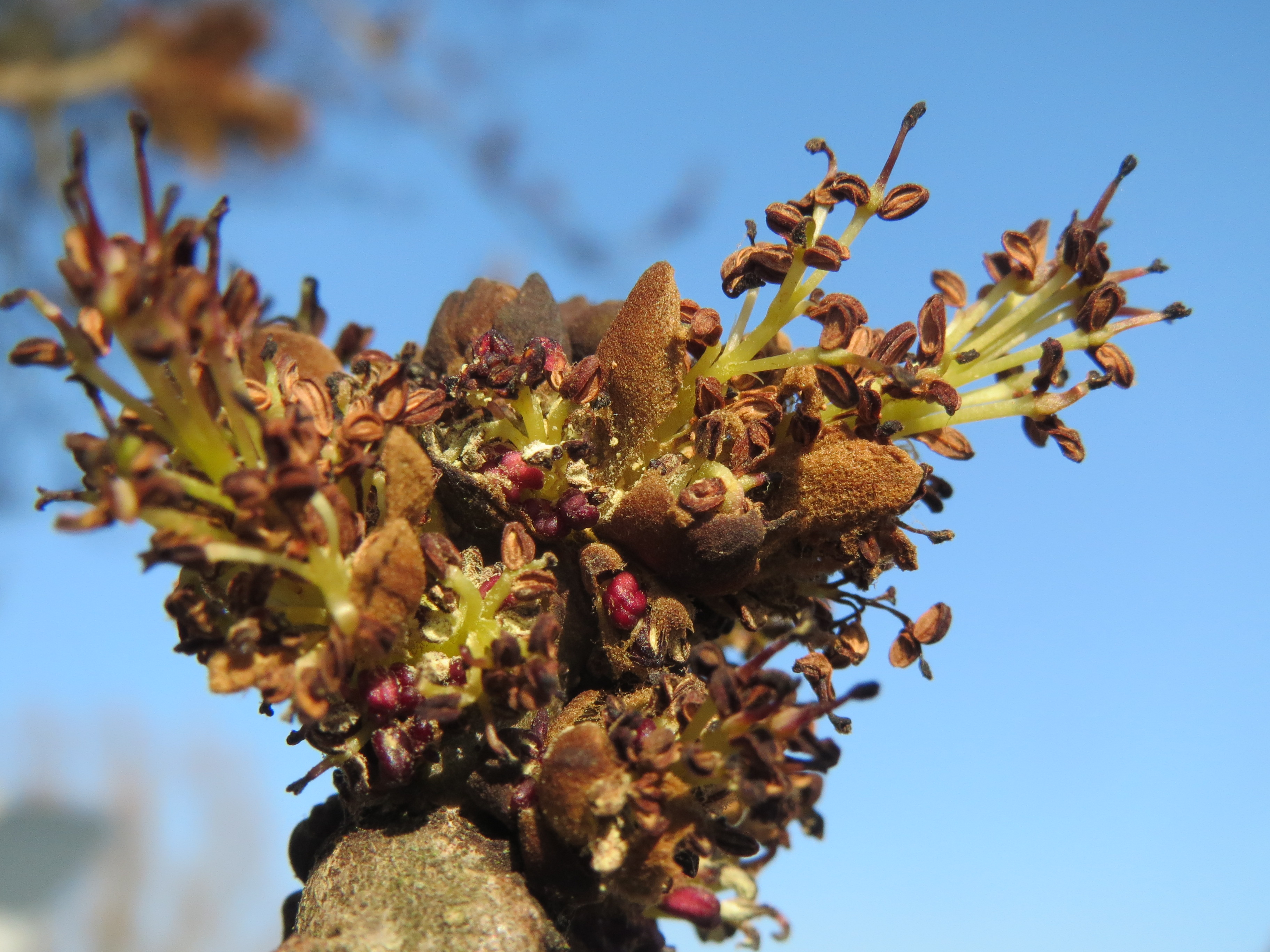 Esche (Fraxinus excelsior) im Hockenheimer Rheinbogen